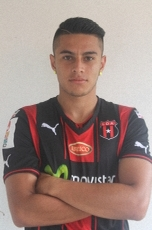 Ronald Matarrita Ulate es un jugador costarricense nacido el 9 de julio de 1994. Juega con la Liga Deportiva Alajuelense en la primera division de Costa Rica.